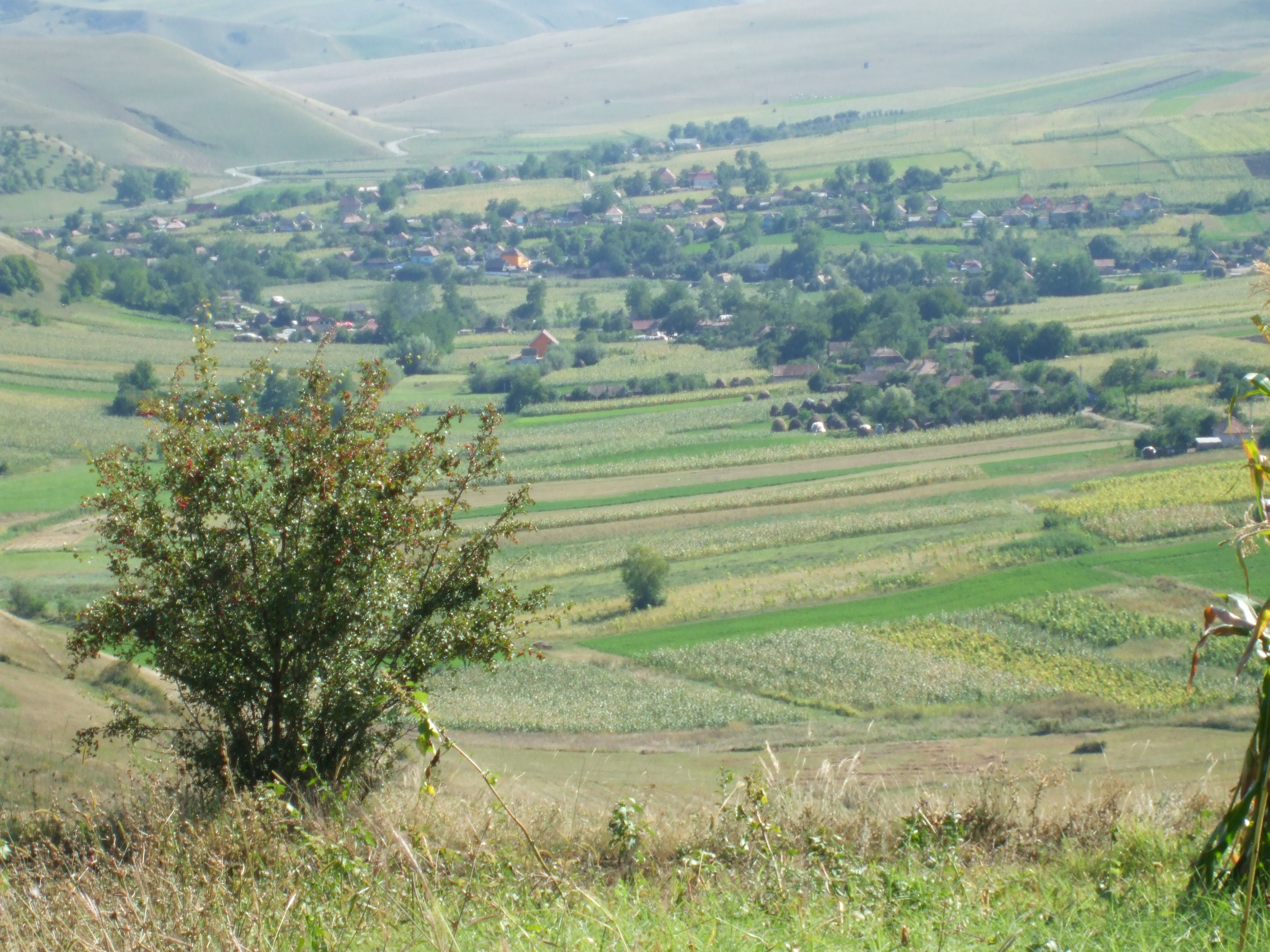 Imagini din Soporu de Campie,com.Frata - vedere dinspre Aruncuta